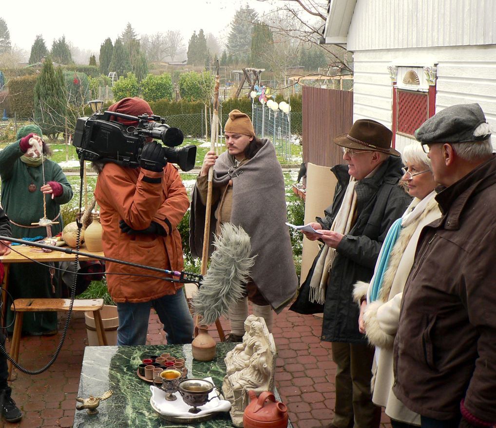 Präsentation der Petition "Erhalt des Römerlagers Wilkenburg" der "Initiative Kultur bergen, statt Kies" im Infocenter am Römischen Marschlager Wilkenburg bei Dreharbeiten des NDR